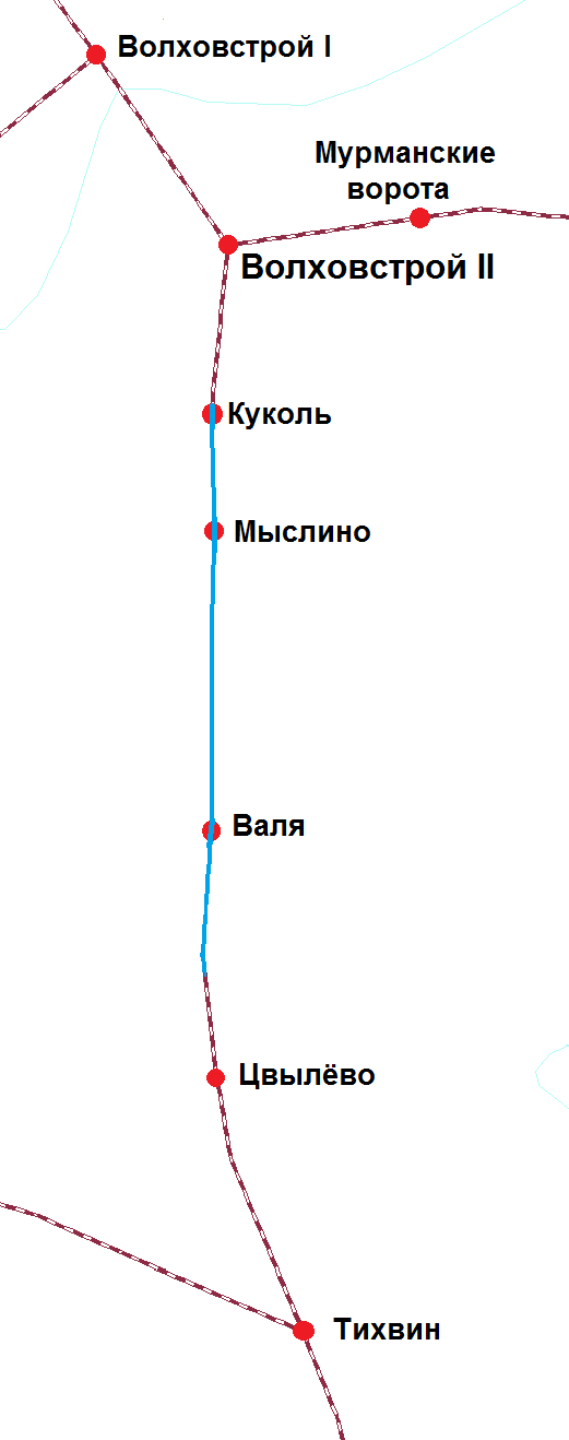 Маршрут следования поезда № 1908 с момента выхода из под контроля